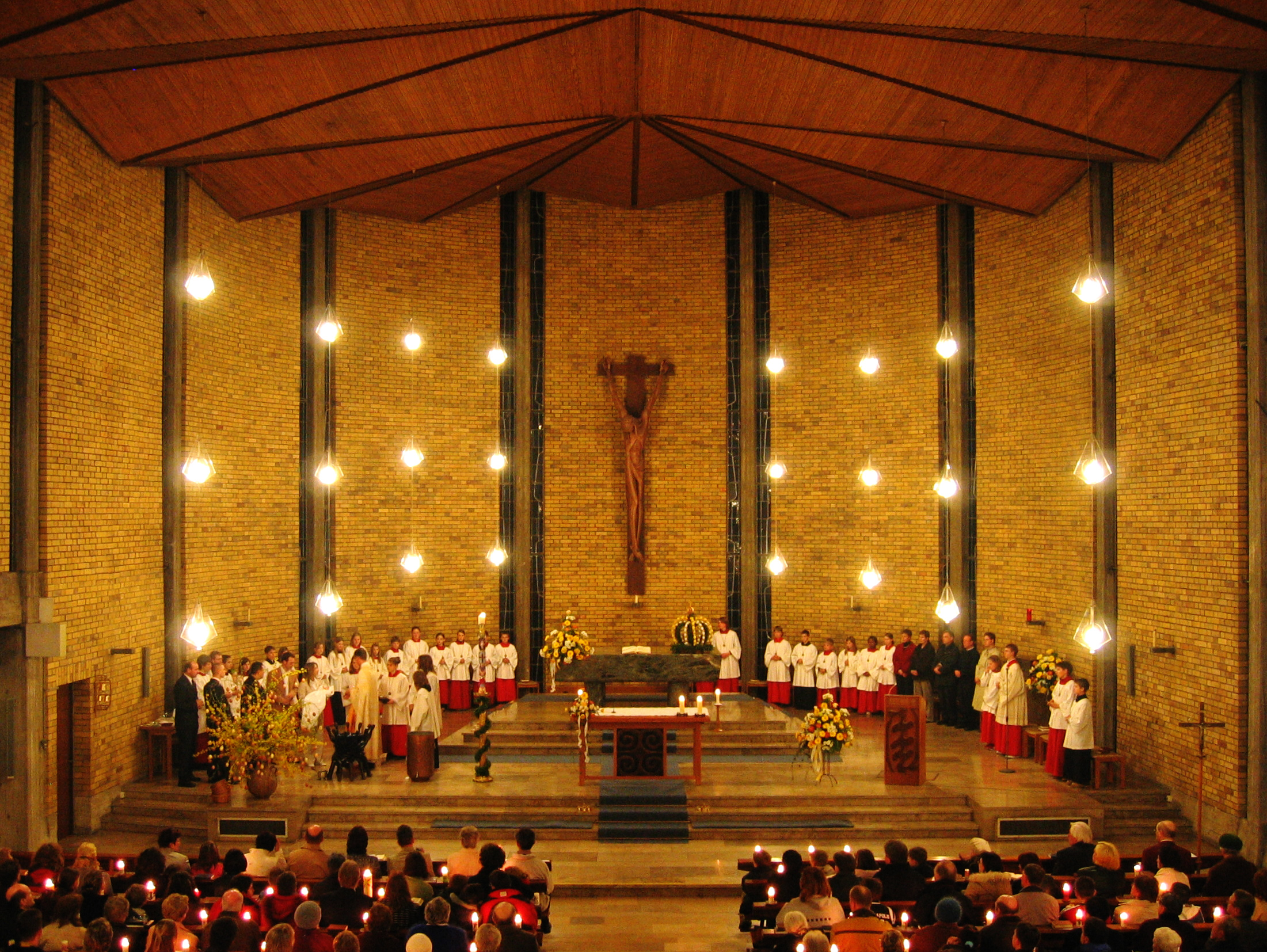 Innenraum der katholischen Kirche St. Joseph in Öhringen, Gottesdienst in der Osternacht